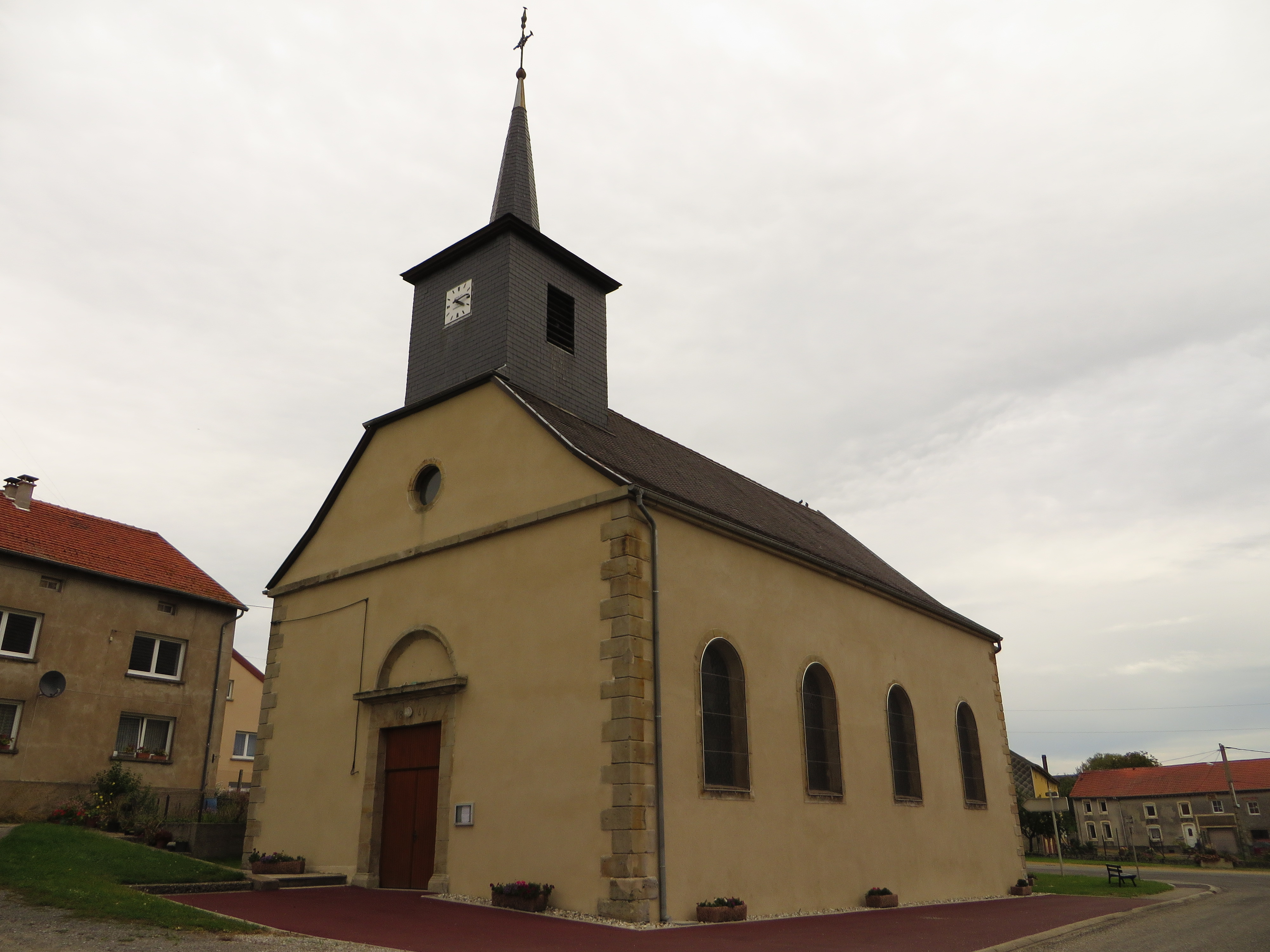 Nelling eglise